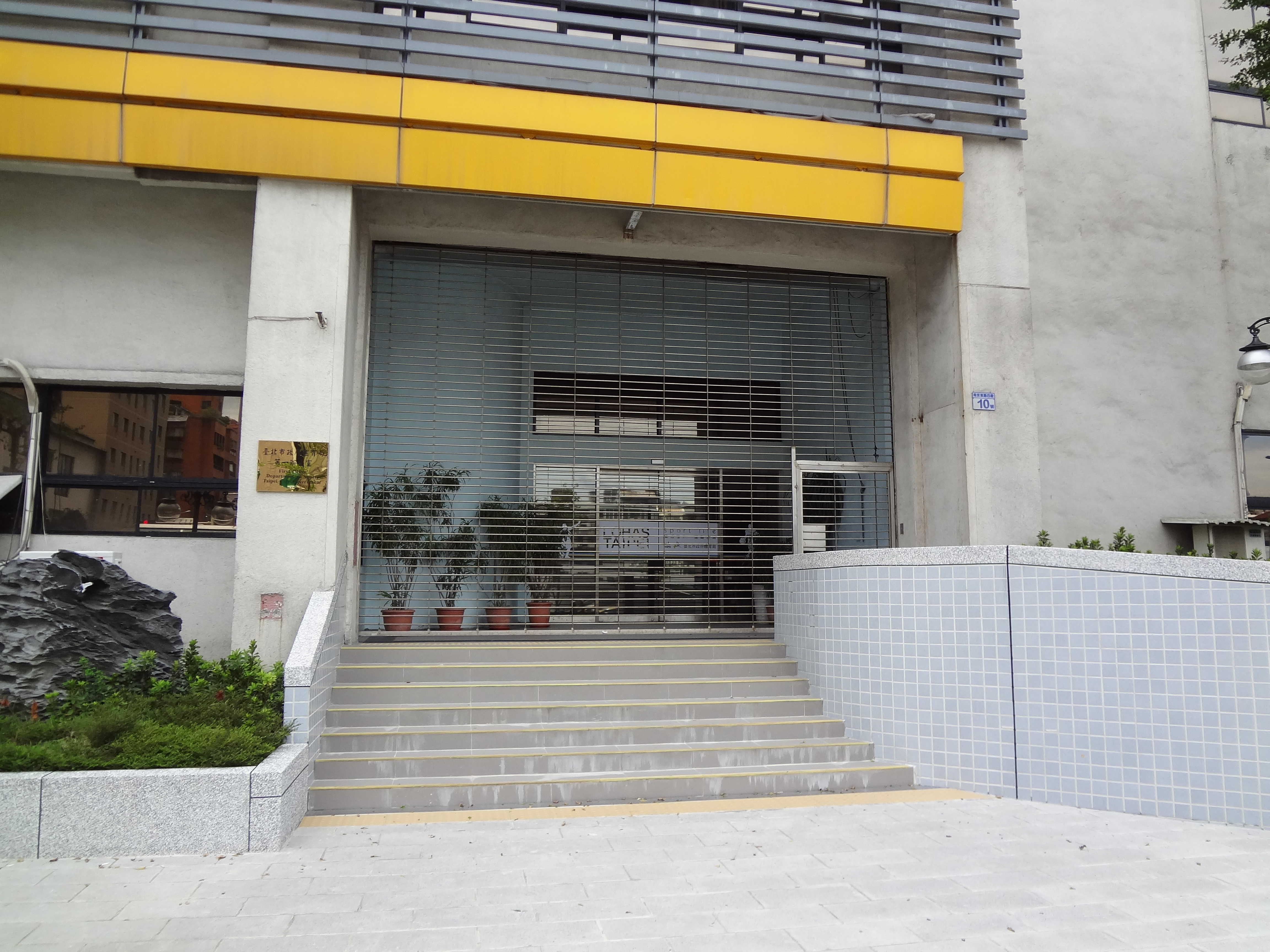 臺北市政府體育局第一辦公室，位於臺北市松山區南京東路四段10號（臺北體育館）。